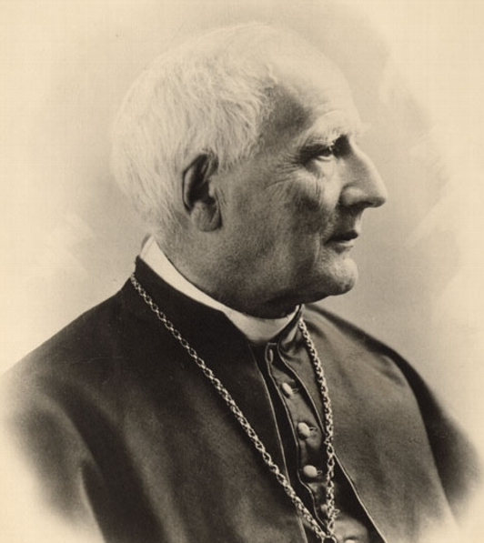 Louis-François Richer Laflèche (1818-1898)